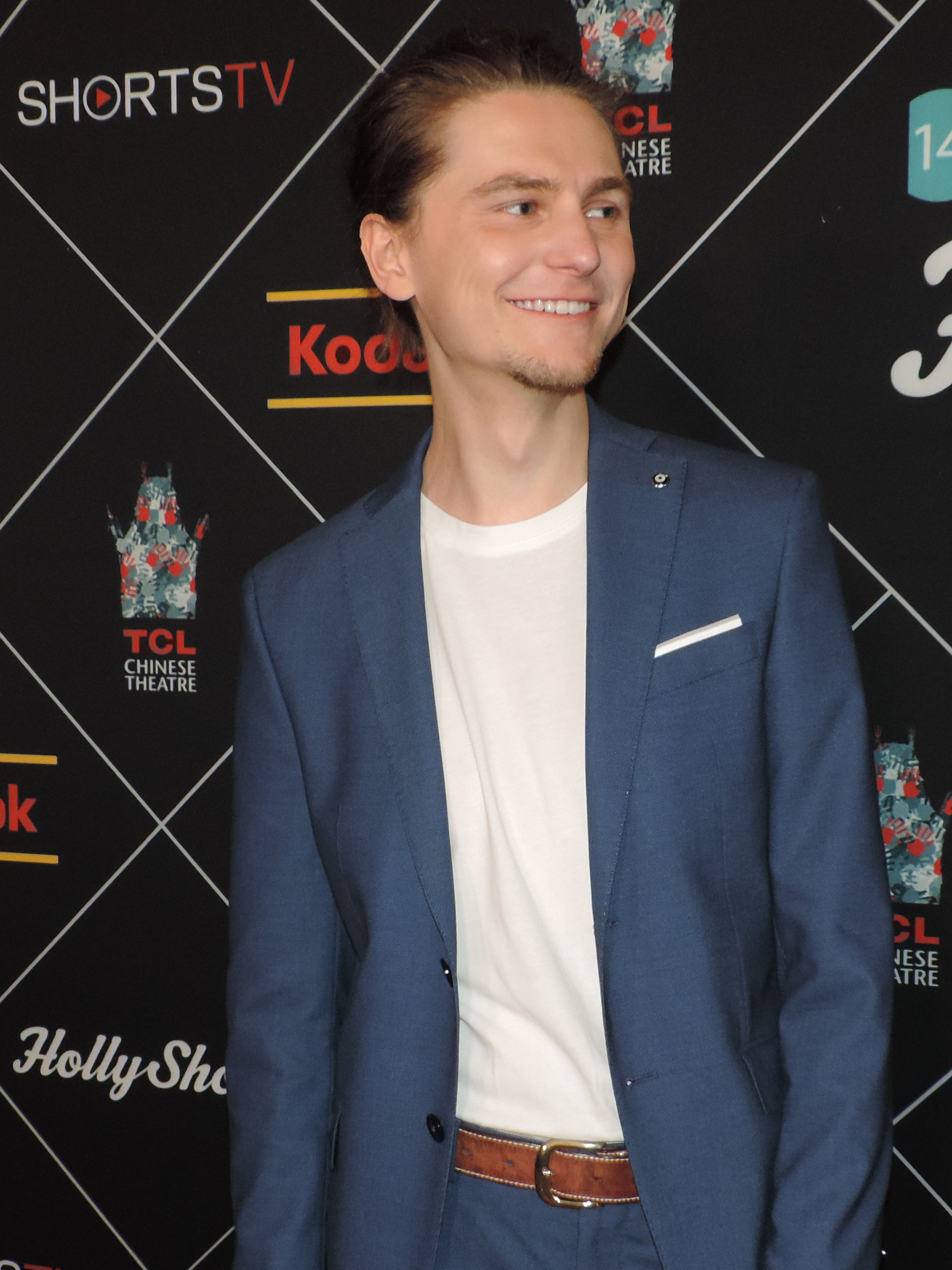 Emil Schwarz bei den HollyShorts 2018 in Los Angeles, CA